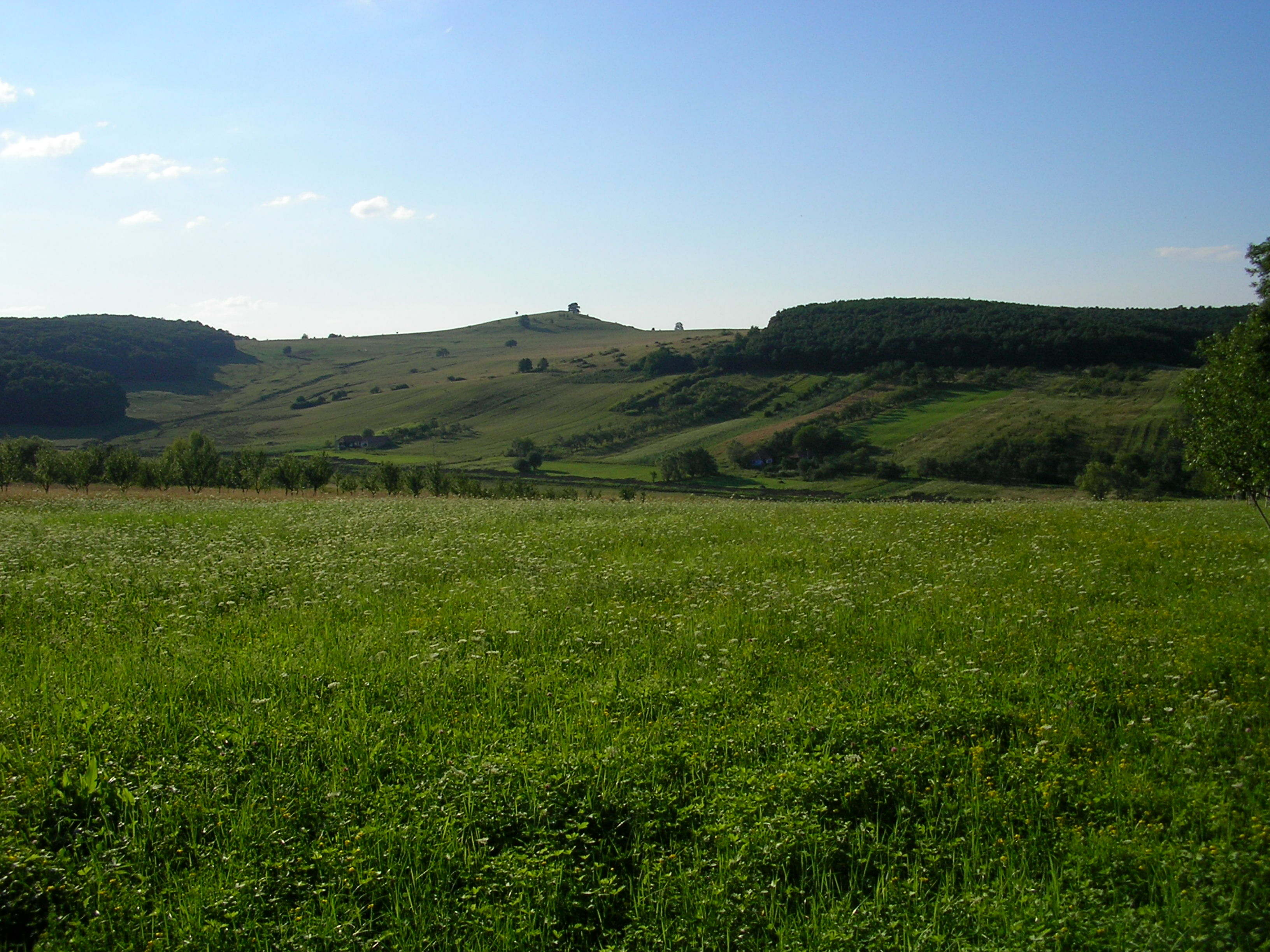 Ratoveiul copilăriei lui Borz - azi